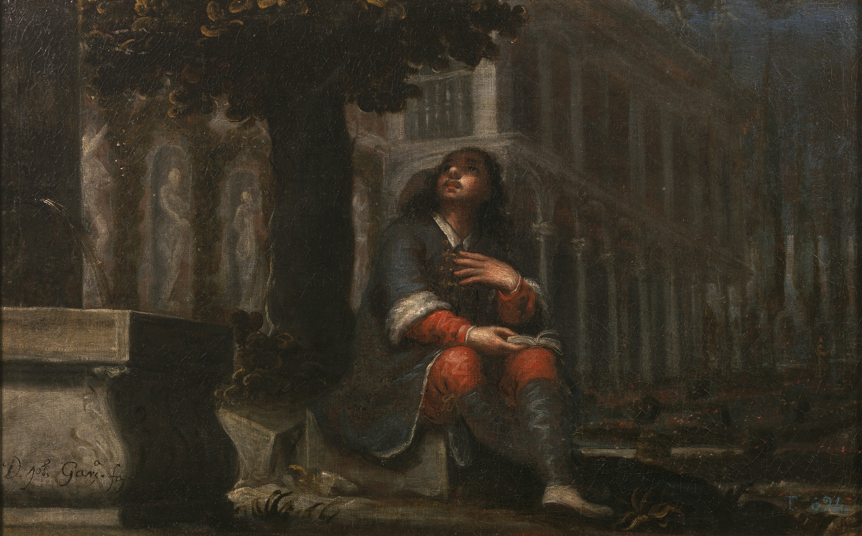 La obra representa el momento en que San Agustín de Hipona, uno de los Padres de la Iglesia, se convirtió al cristianismo.